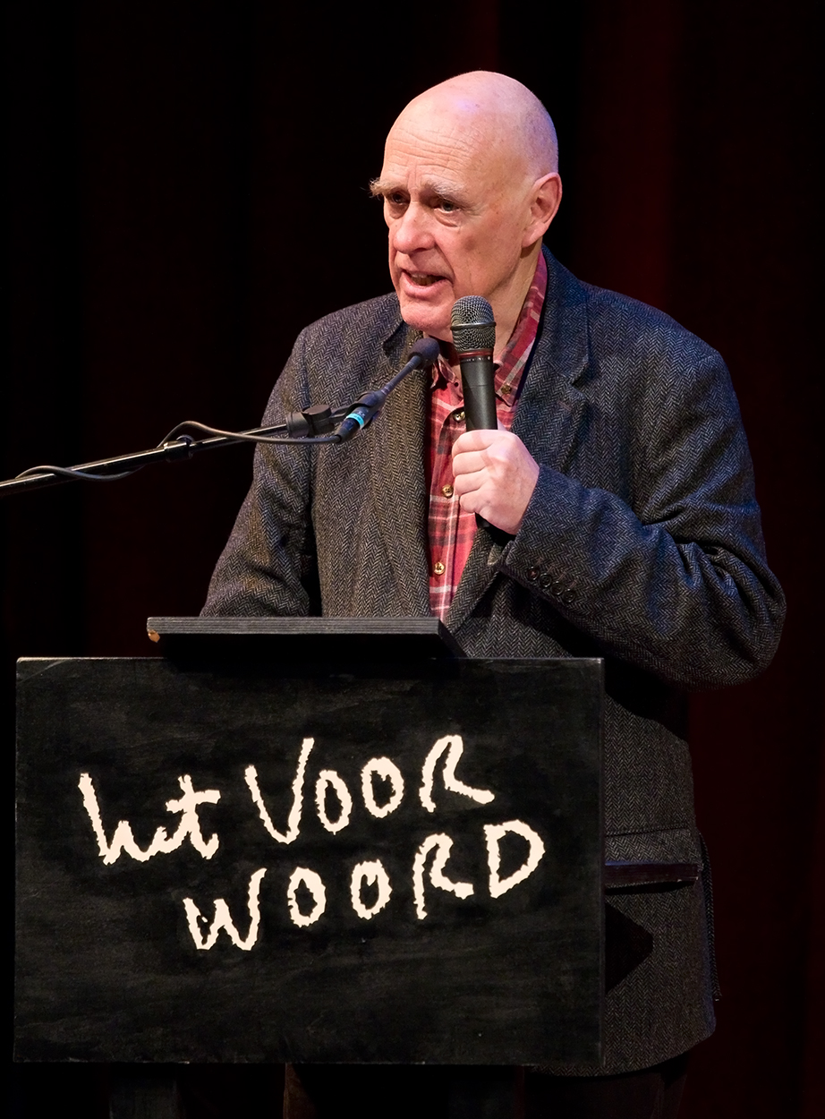 Hugo Brandt Corstius (Eindhoven, 29 augustus 1935) is een Nederlands schrijver en wetenschapper die zowel in de alfa- als in de bètawetenschappen zijn sporen heeft verdiend. Hij is onder andere als columnist bekend geworden onder zijn pseudoniemen Piet Grijs, Stoker, Raoul Chapkis en Battus. -- Foto genomen tijdens Het Voorwoord in Den Haag. Oorspronkelijke beeld is geplaatst op